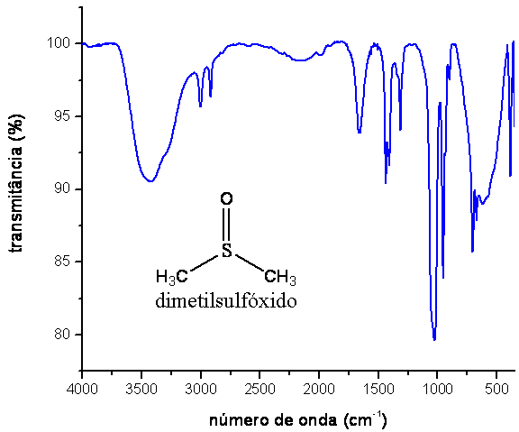 Espectro vibracional na região do infravermelho do dimetilsulfóxido